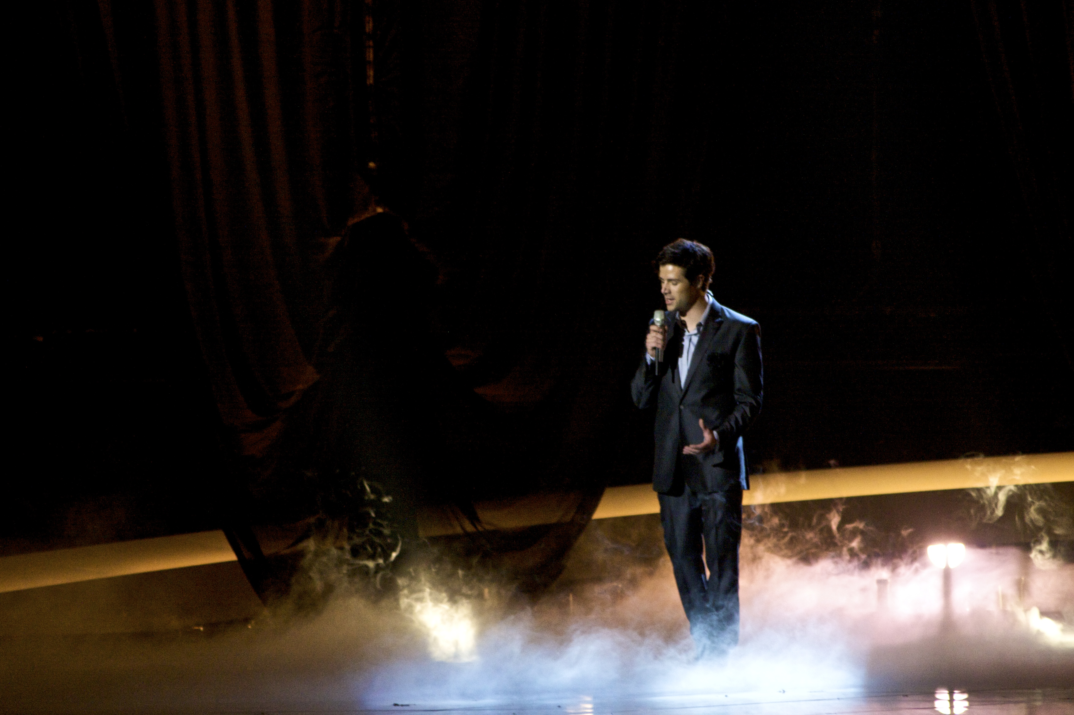 Foto: Vincent Hasselgård, Aktiv I Oslo.no Les artikkel på